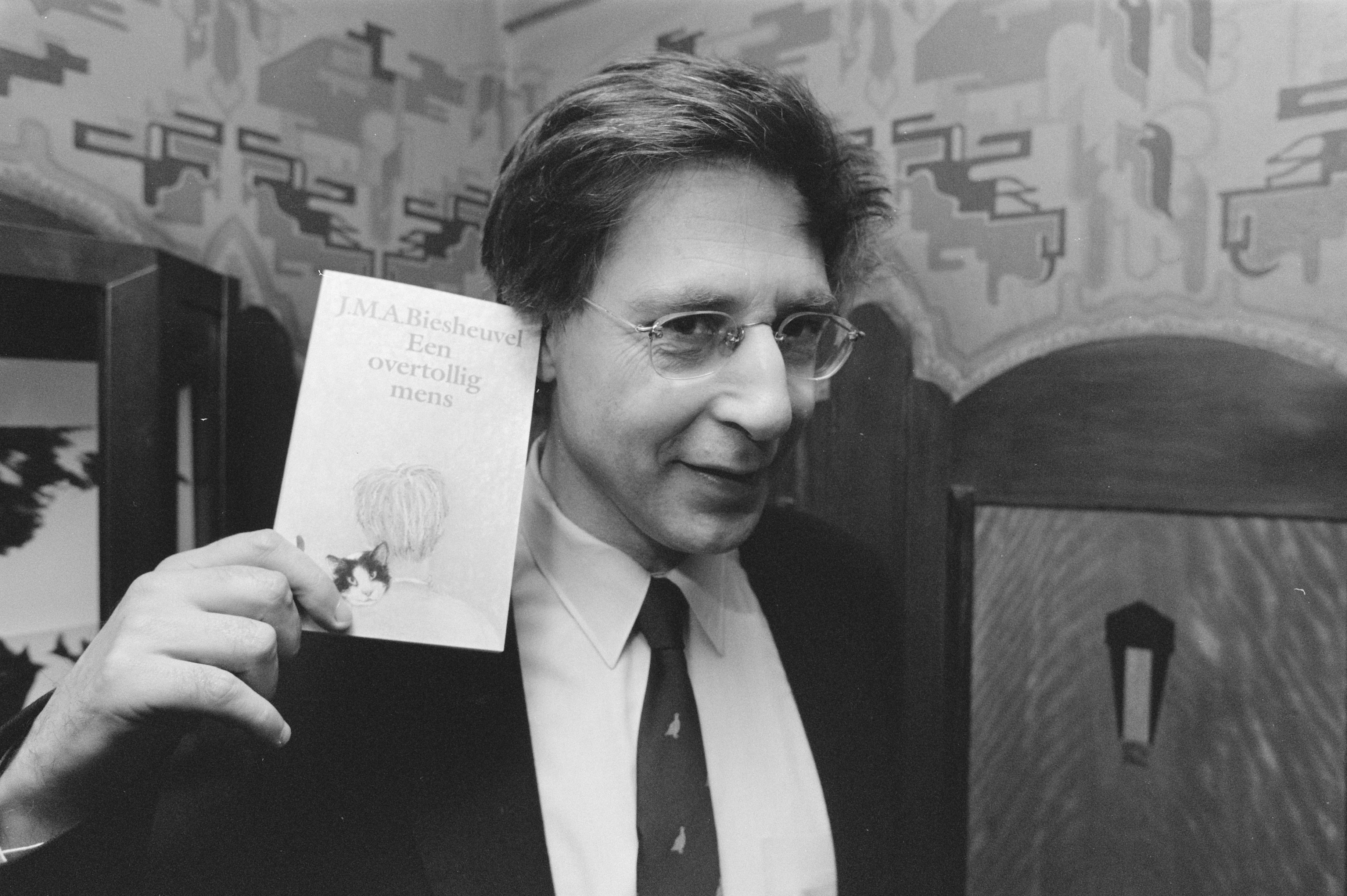 Collectie / Archief : Fotocollectie Anefo Reportage / Serie : [ onbekend ] Beschrijving : Maarten Biesheuvel met Boekenweekgeschenk88 Datum : 15 februari 1988 Fotograaf : Bogaerts, Rob / Anefo Auteursrechthebbende : Nationaal Archief Materiaalsoort : Negatief (zwart/wit) Nummer archiefinventaris : bekijk toegang 2.24.01.05 Bestanddeelnummer : 934-1901